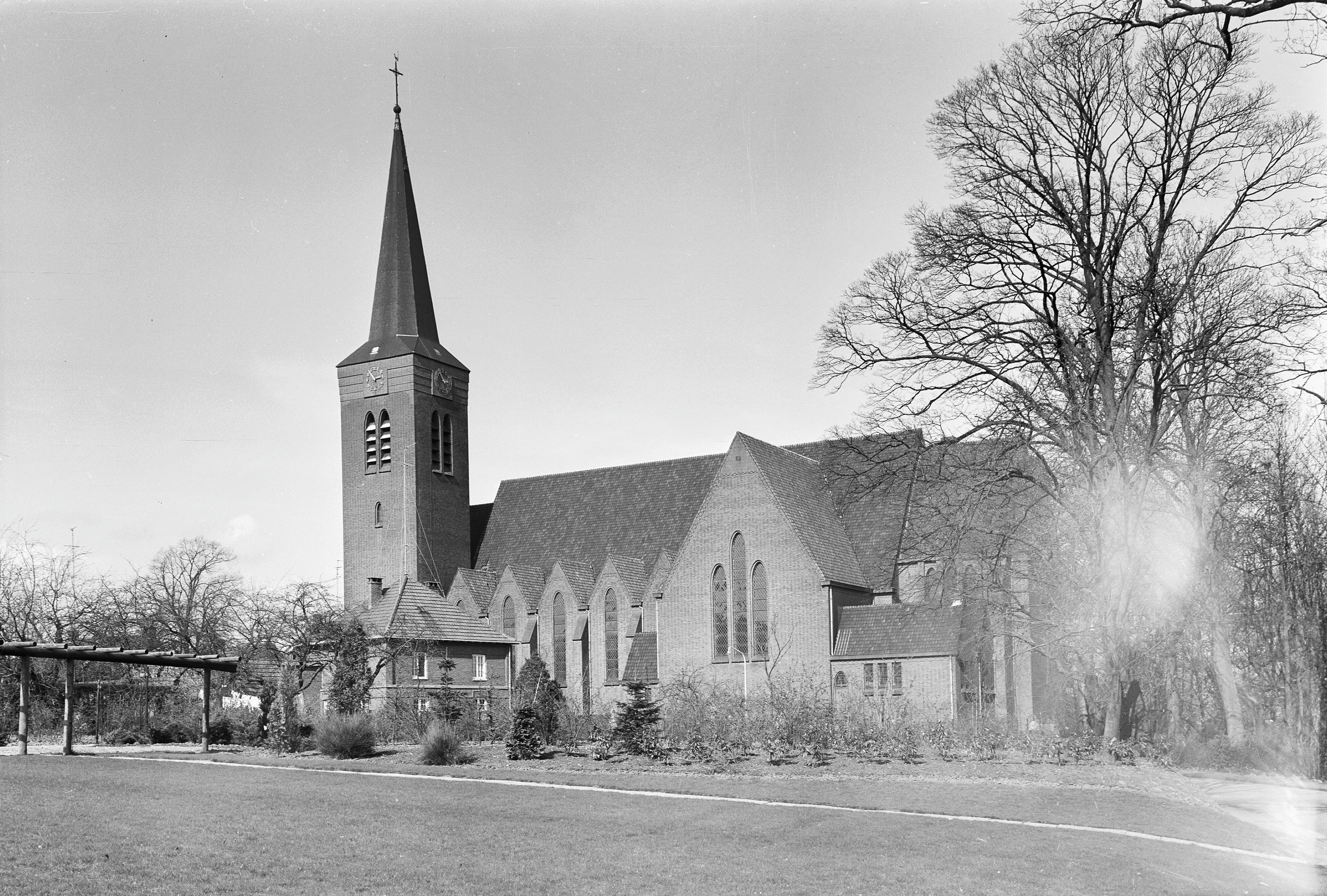 Rooms-Katholieke Kerk: exterieur Raadhuisplein (1935) - Horn, Kerkstraat 3 - Sint Martinuskerk (1937)